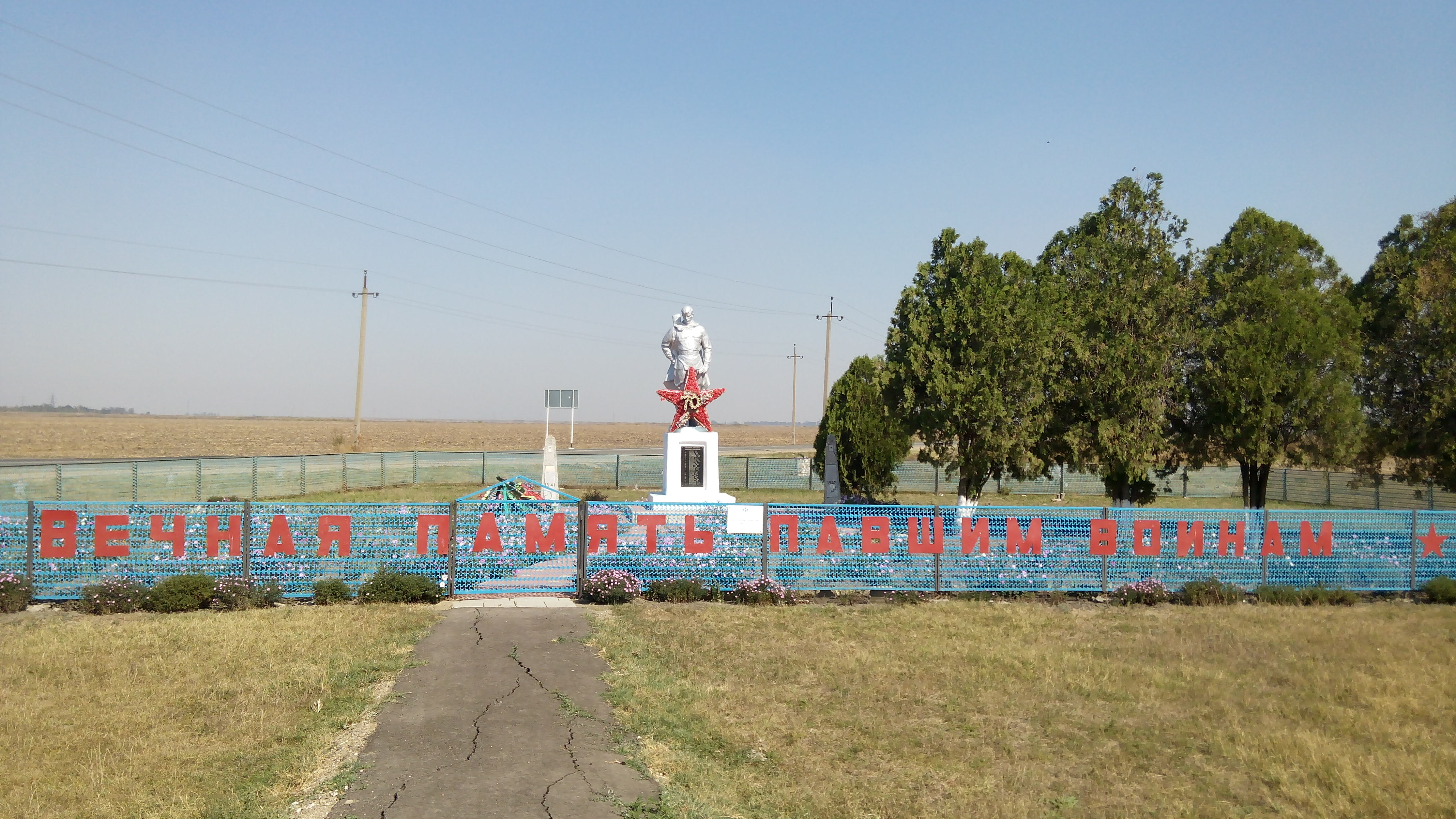 братская могила 181 советского воина, погибшего в боях с фашистскими захватчиками: зап.окраина, станица новониколаевская, Калининский район, Краснодарский край